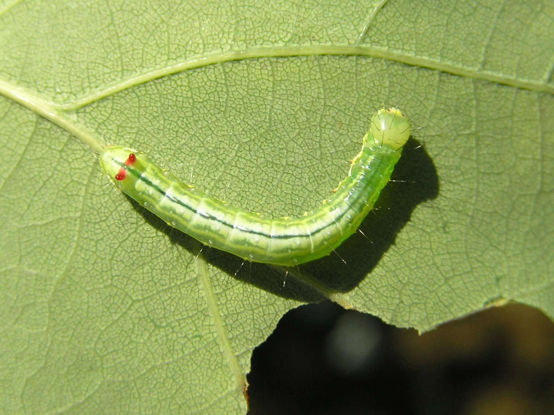 Lophopteryx capucina, wiechetka wielbłądka, Polska